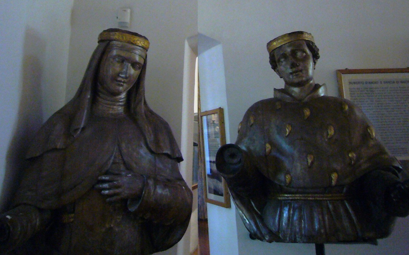 Napoli s Chiara museo - Sancia e Roberto d'Angiò